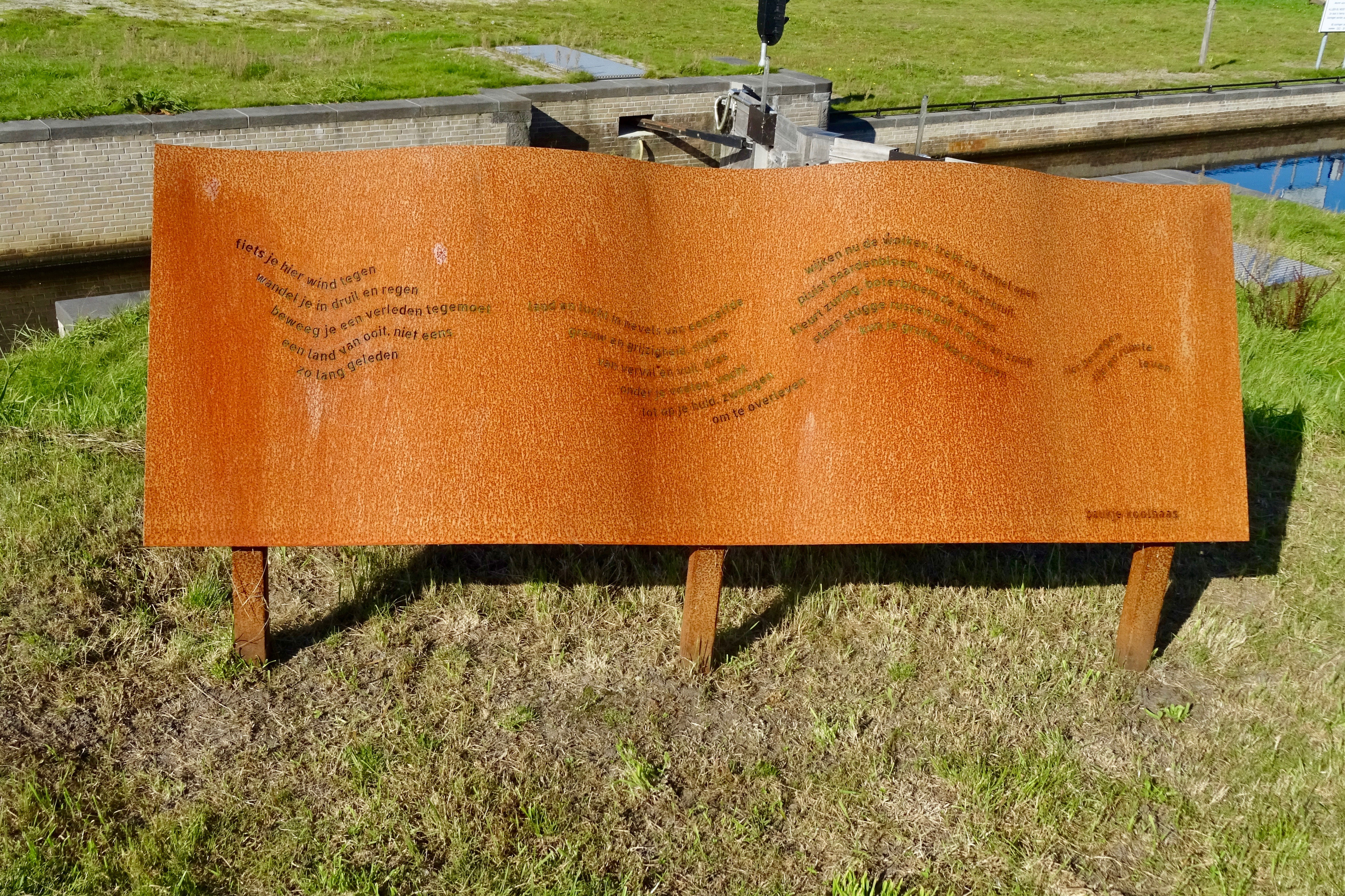 Gedicht van Baukje Koolhaas op cortenstaal bij de Schouwstraslûs langs de Skipsleat